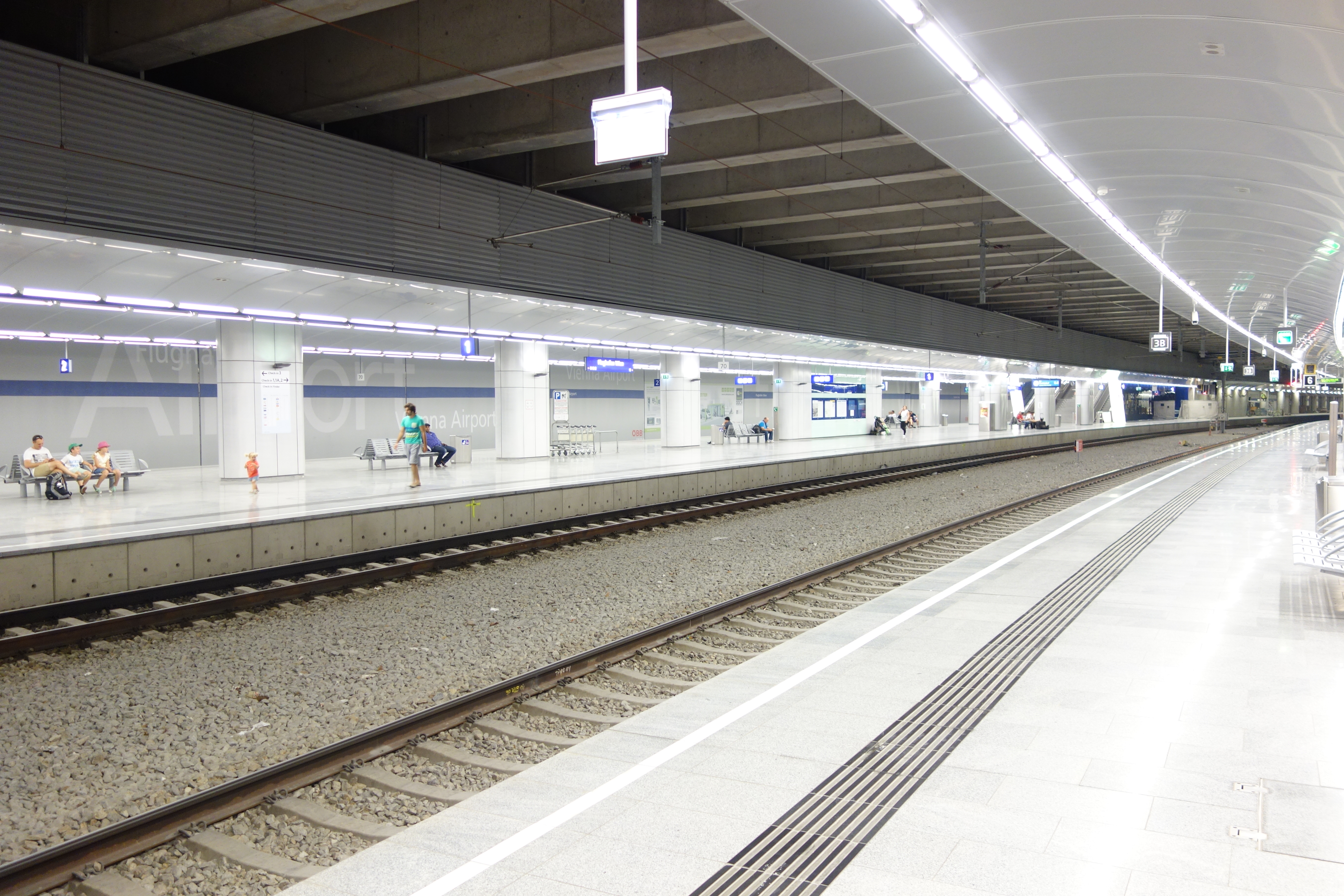 Bahnsteige am Bahnhof Flughafen Wien im Juli 2014. Das Bild zeigt den östlichen Bahnhofsbereich.